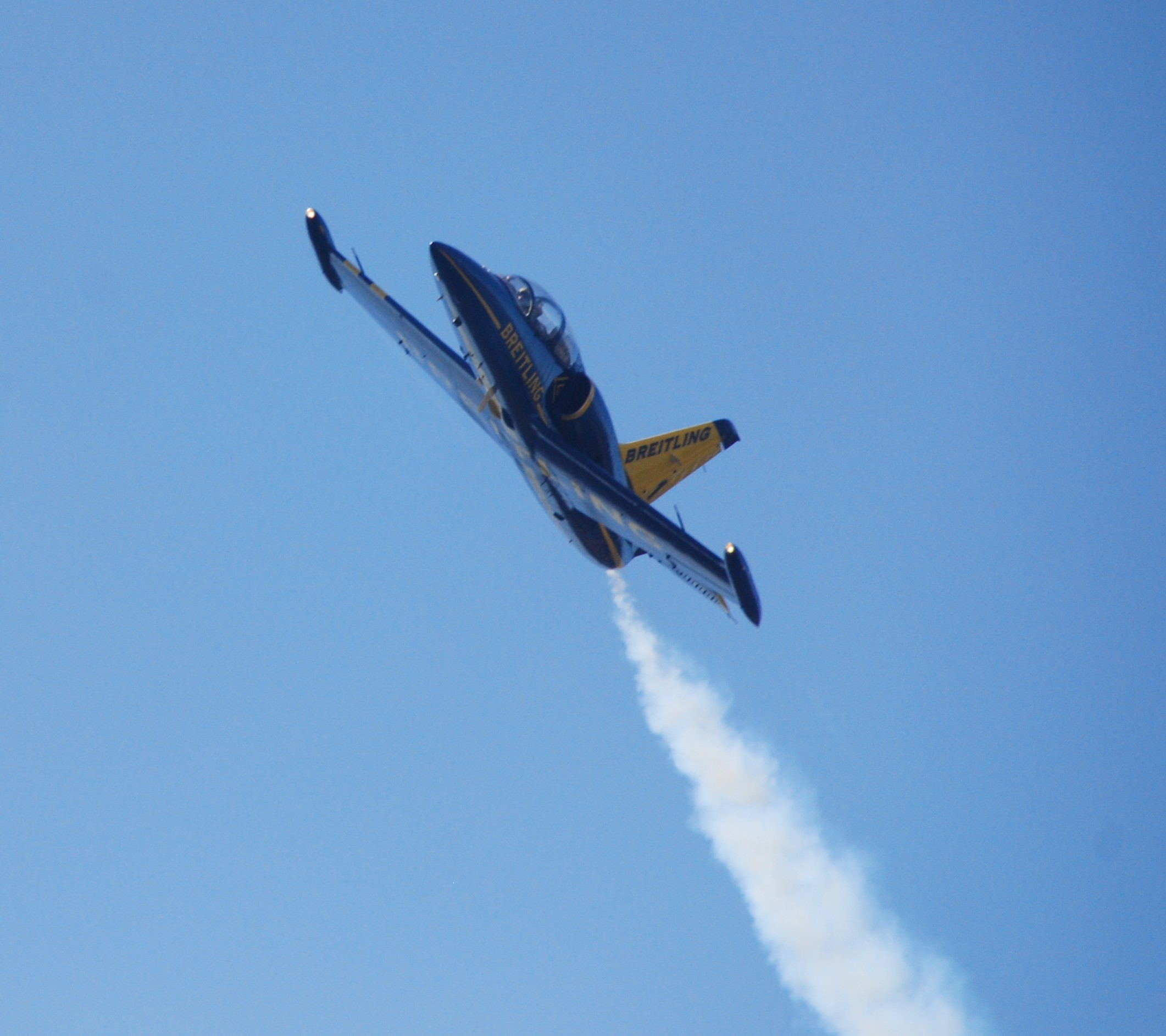 Jet